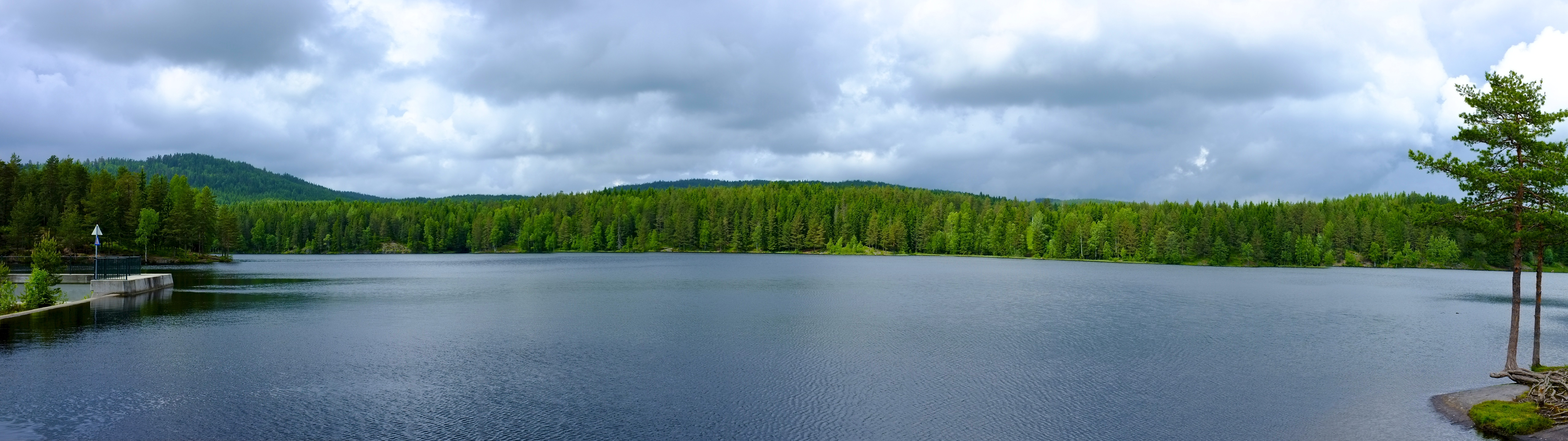 Østernvann i Bærum